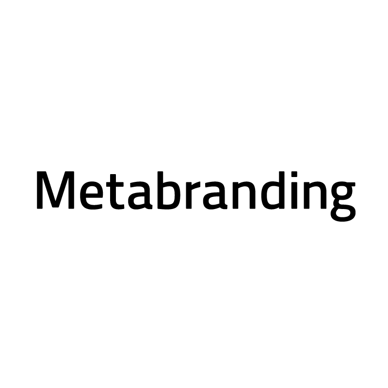 메타브랜딩 로고